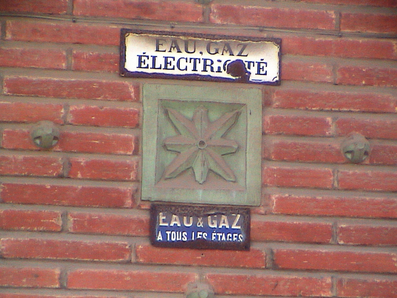 Schild an einem Haus in der Innenstadt von Arcachon